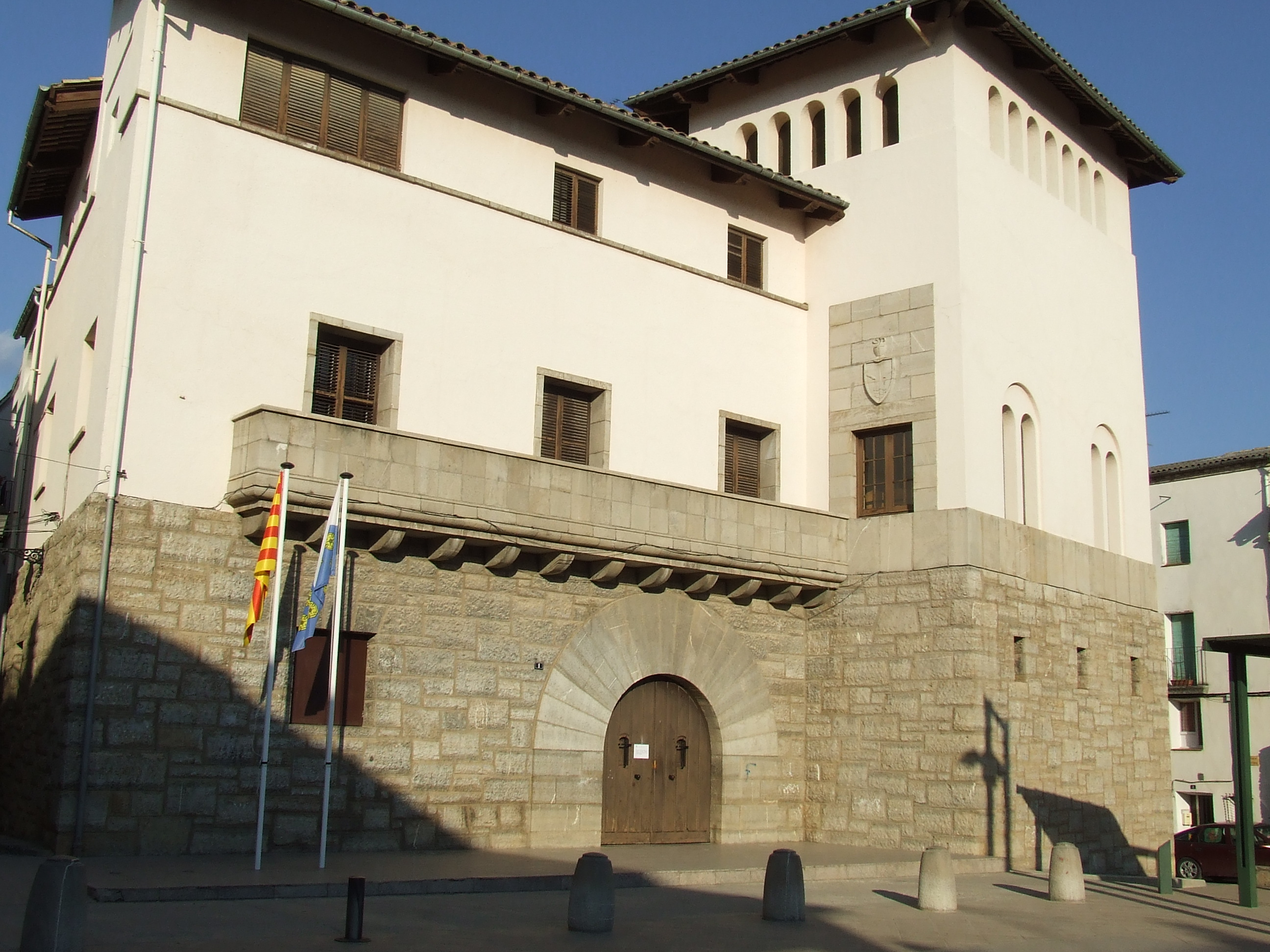 Actual ajuntament d'Isona, reconstruït després de la Guerra Civil.